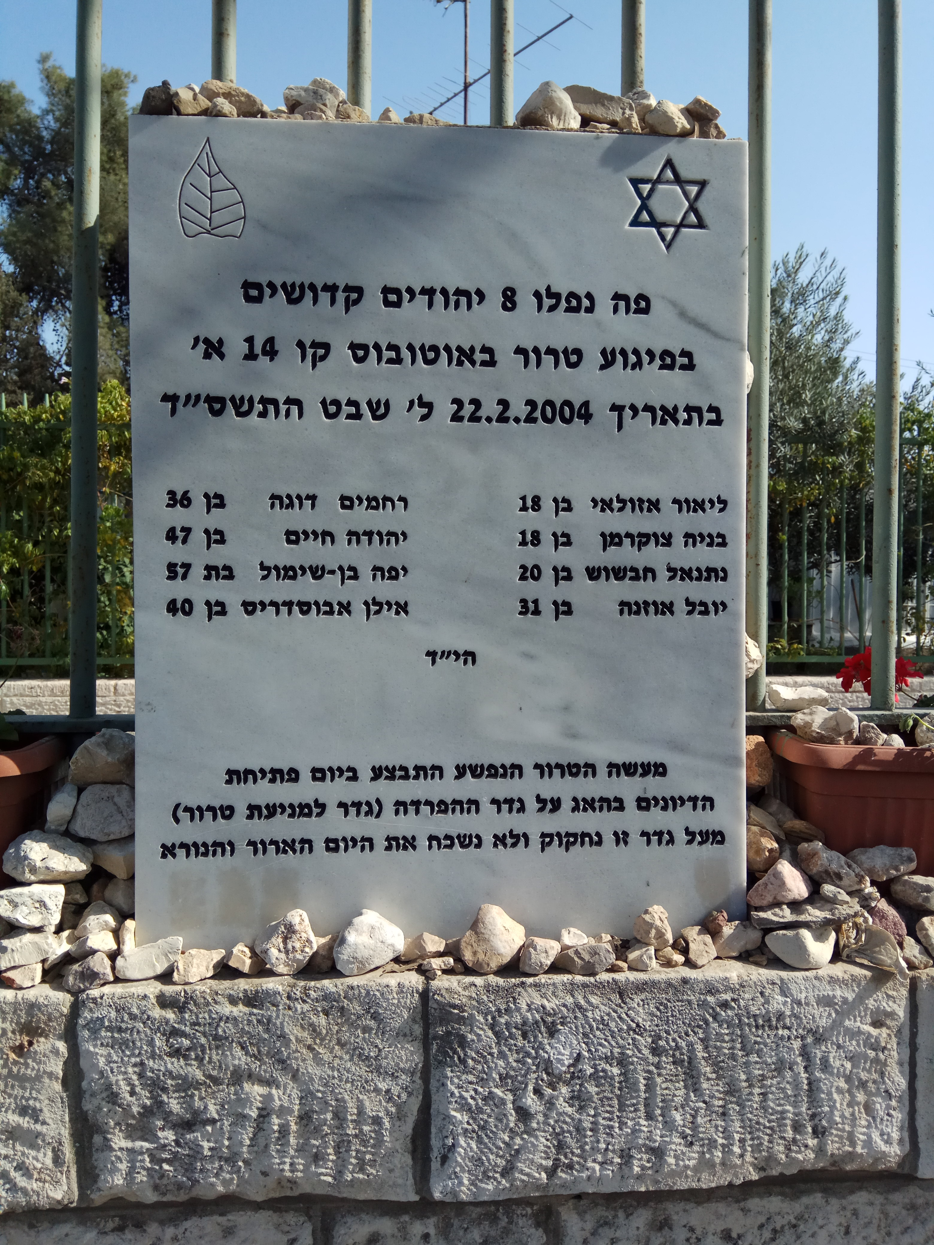 שלט זיכרון לנרצחי פיגוע בירושלים ב-22/2/04